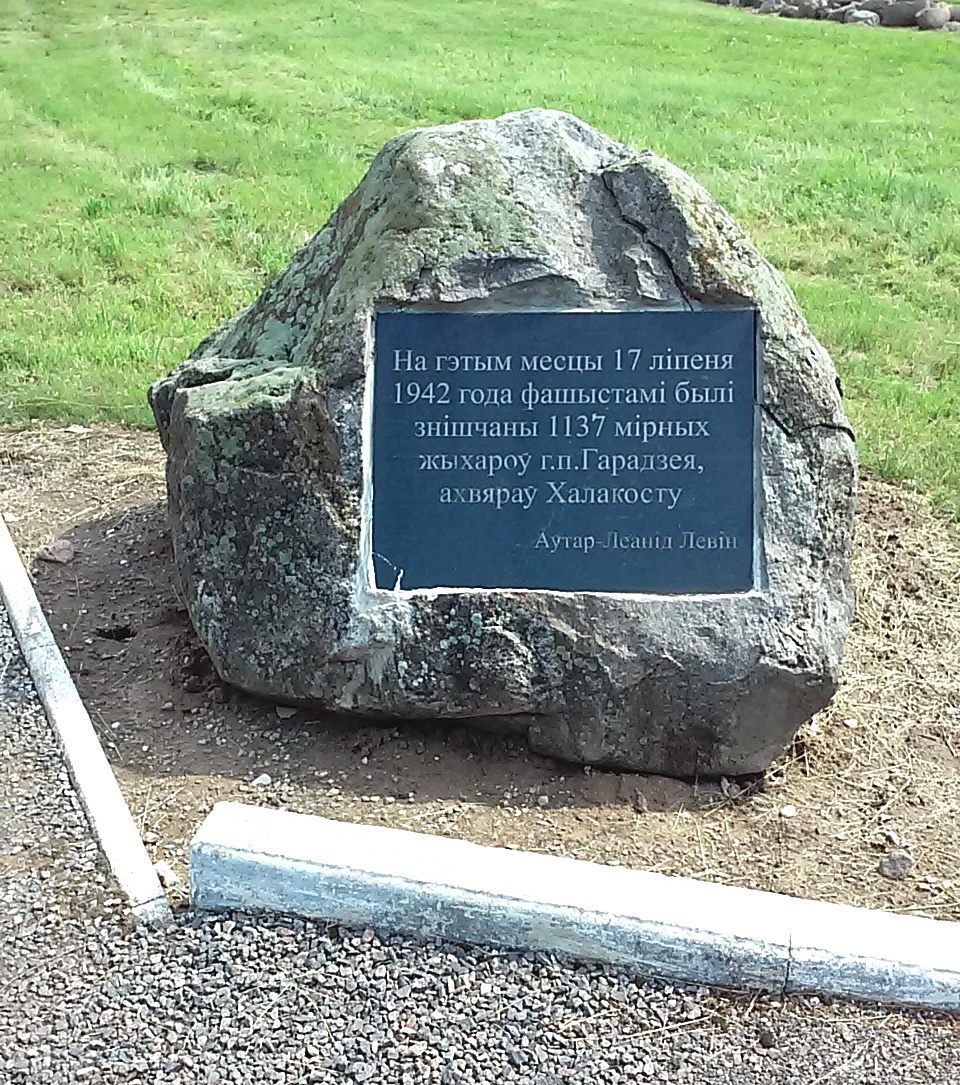 Мемориальный комплекс погибшим евреям из гетто посёлка Городея (Несвижский район). Представляет собой разрушенный угол символического еврейского дома, в котором о жилье напоминают только три окна. К месту убийства ведет узкая тропинка вдоль аллеи рябин, красные ягоды которой похожи на капли крови. Рядом тянется гряда из 1137 камней-валунов, собранных жителями окружающих деревень в память об убитых евреях